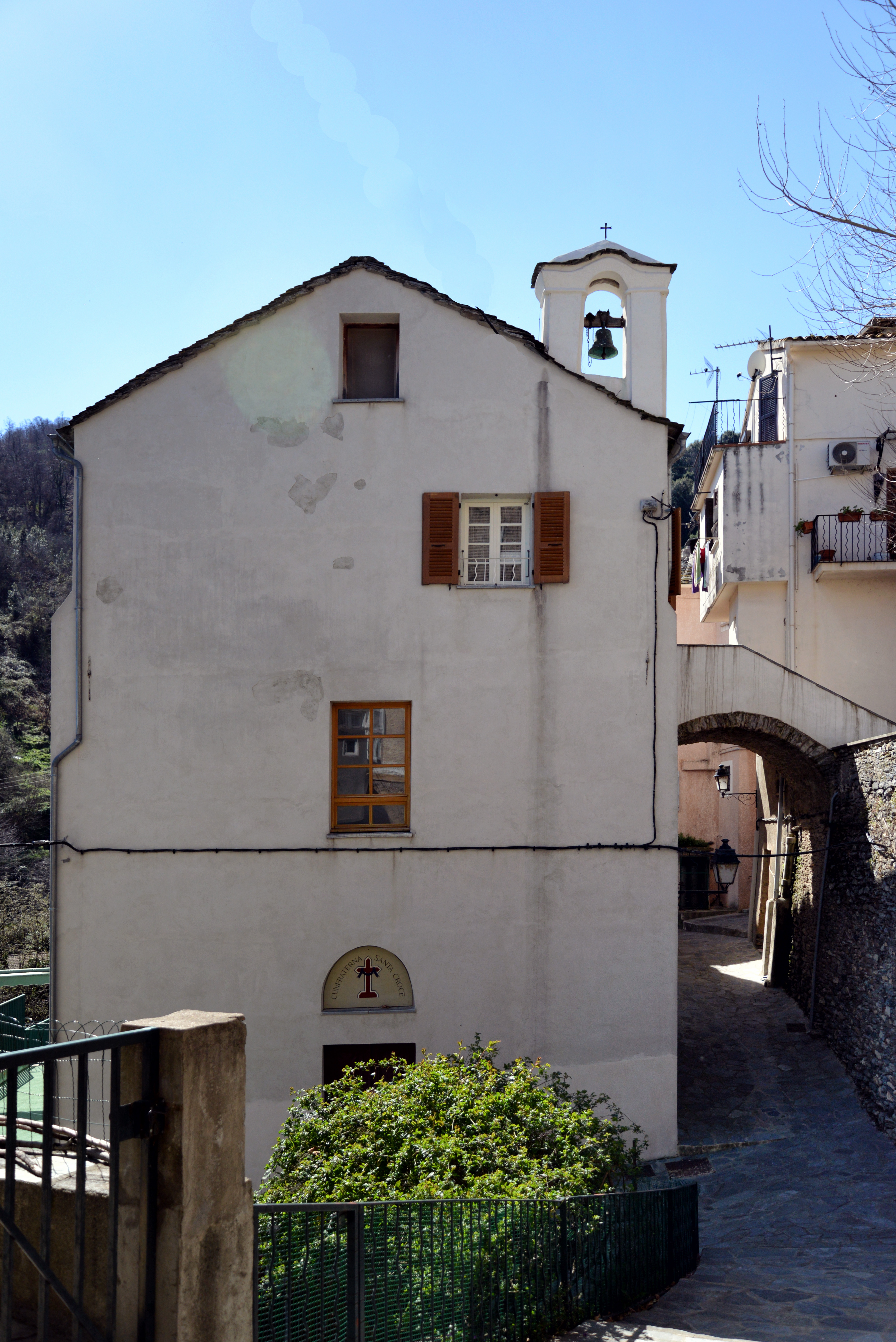 Vescovato, Casinca (Corse) - Chapelle de confrérie Santa Croce